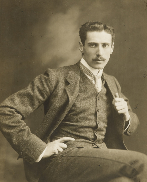 Photographie d'Armand de Gramont, duc de Guiche (1879-1962).